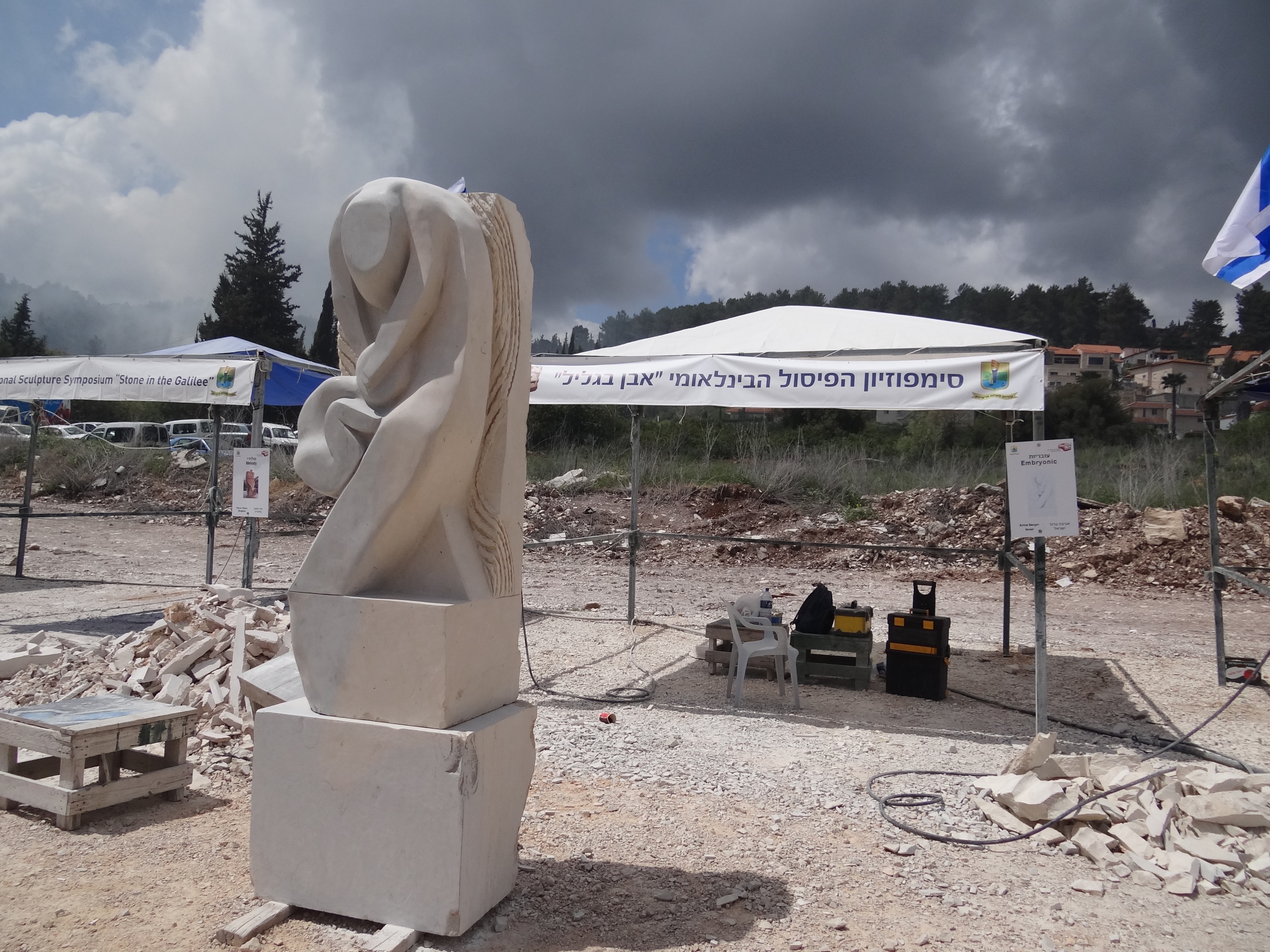 Stone in the Galilee Festival אבן בגליל הוא פסטיבל פיסול המתקיים מידי חג הפסח באגם מונפורט ומאורגן על ידי עיריית מעלות.. פסטיבל 2012 שהתקיים בין התאריכים 11-8 באפריל אקסטרווגנטי, יצירתו של חאתם עווידה מישראל